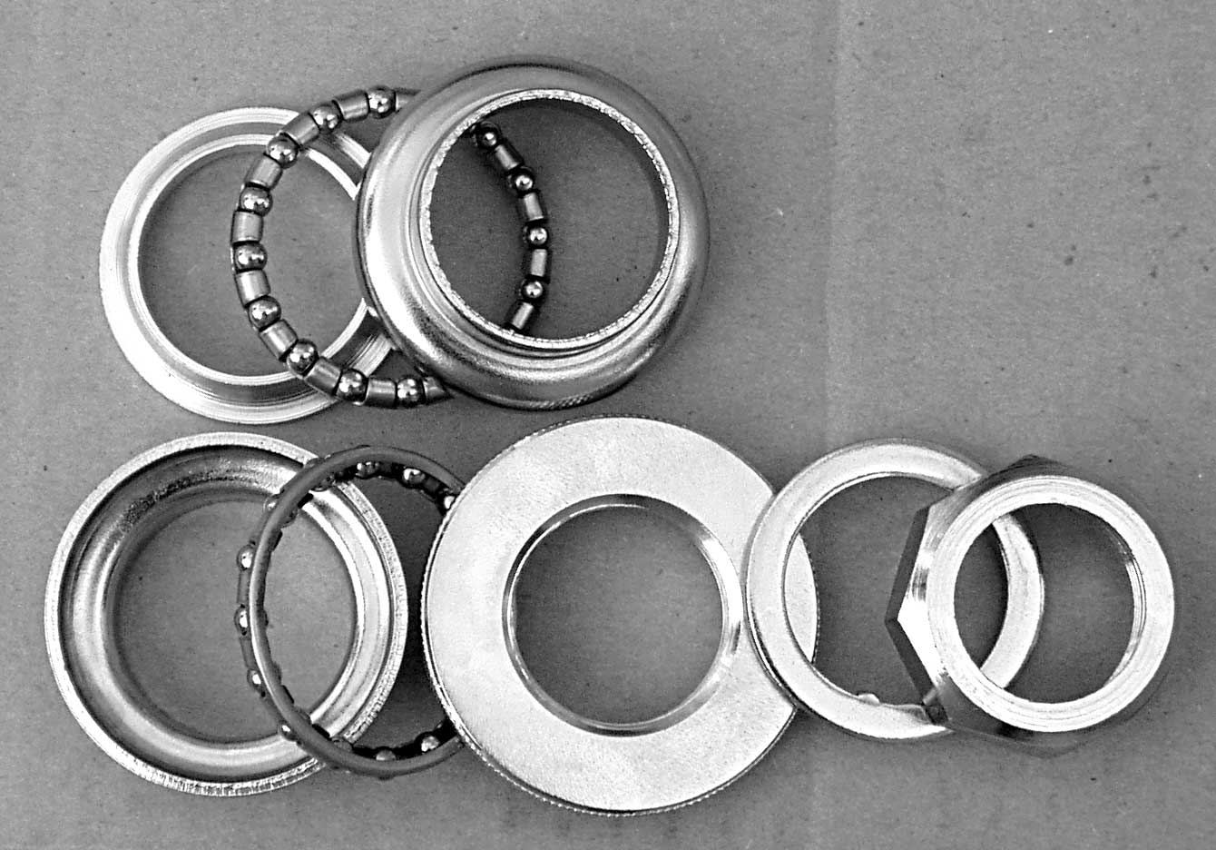 Steuersatz-kugel